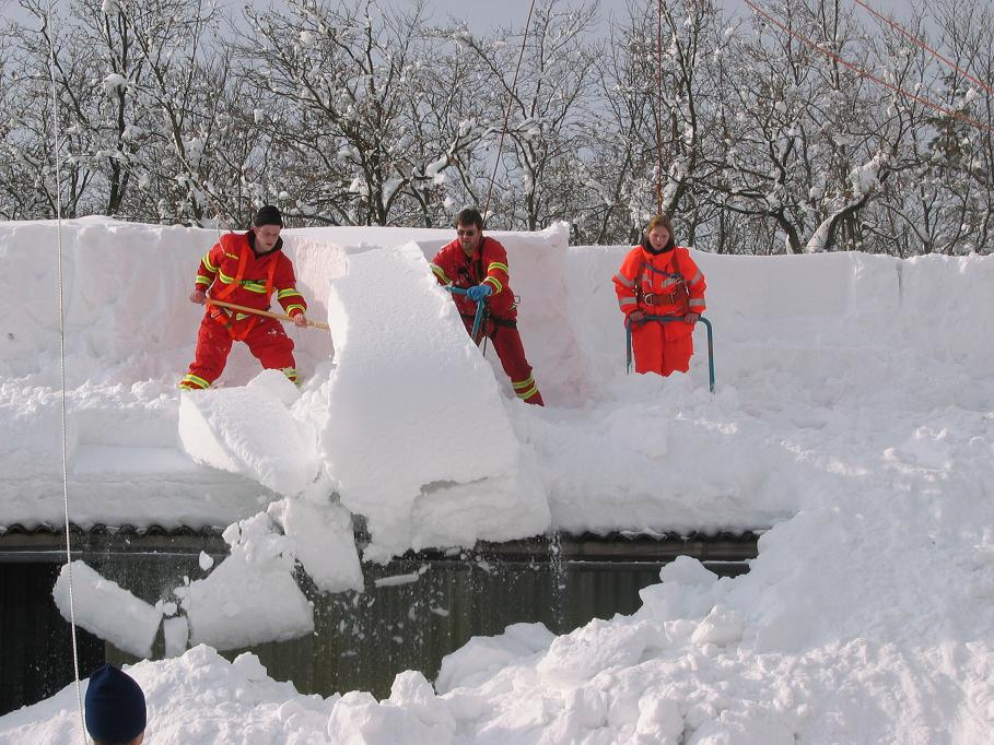 DLRG München Mitte beim Freiräumen von Dächern.